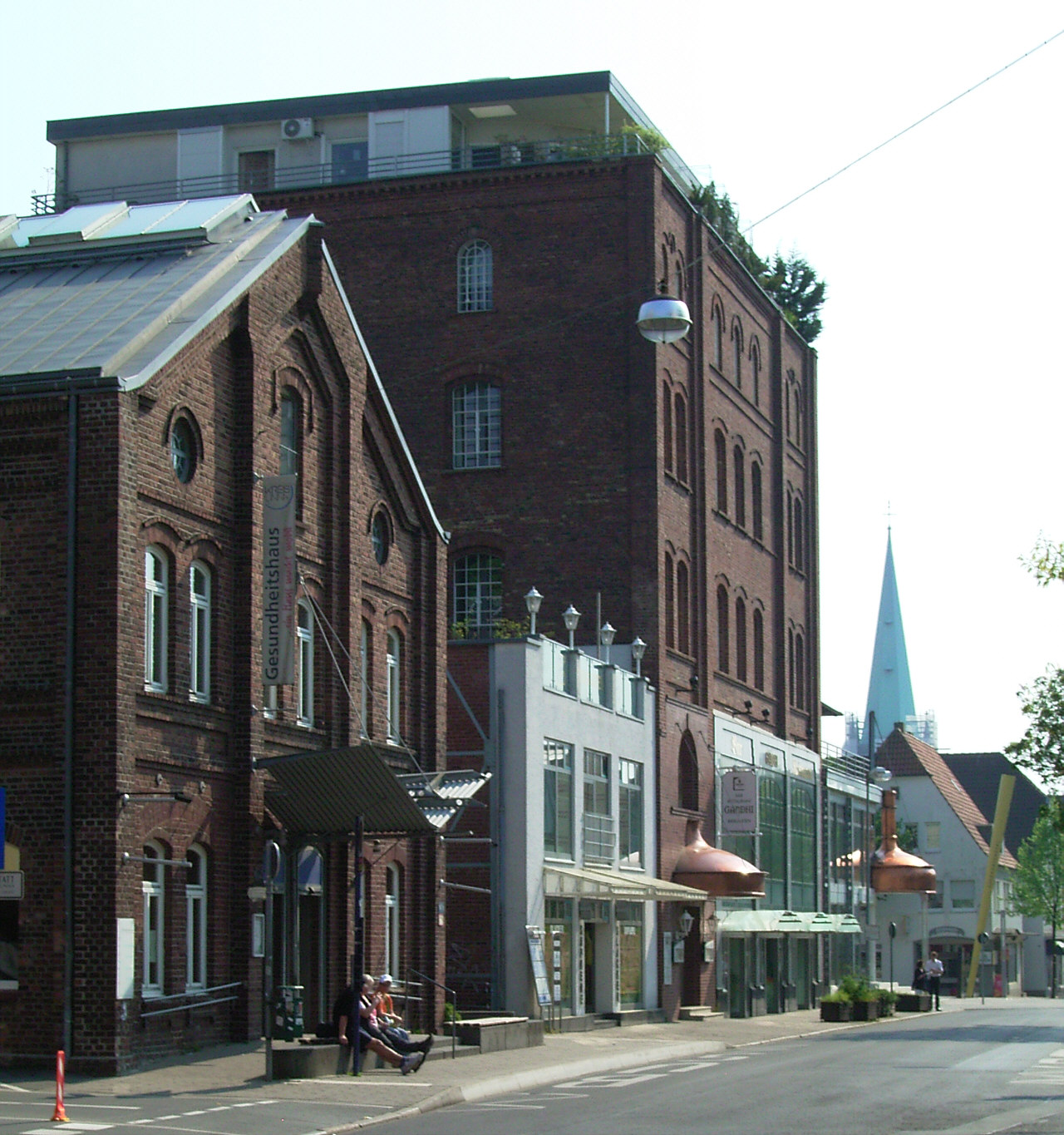 Lindenbrauerei Unna, heute ein soziokulturelles Zentrum